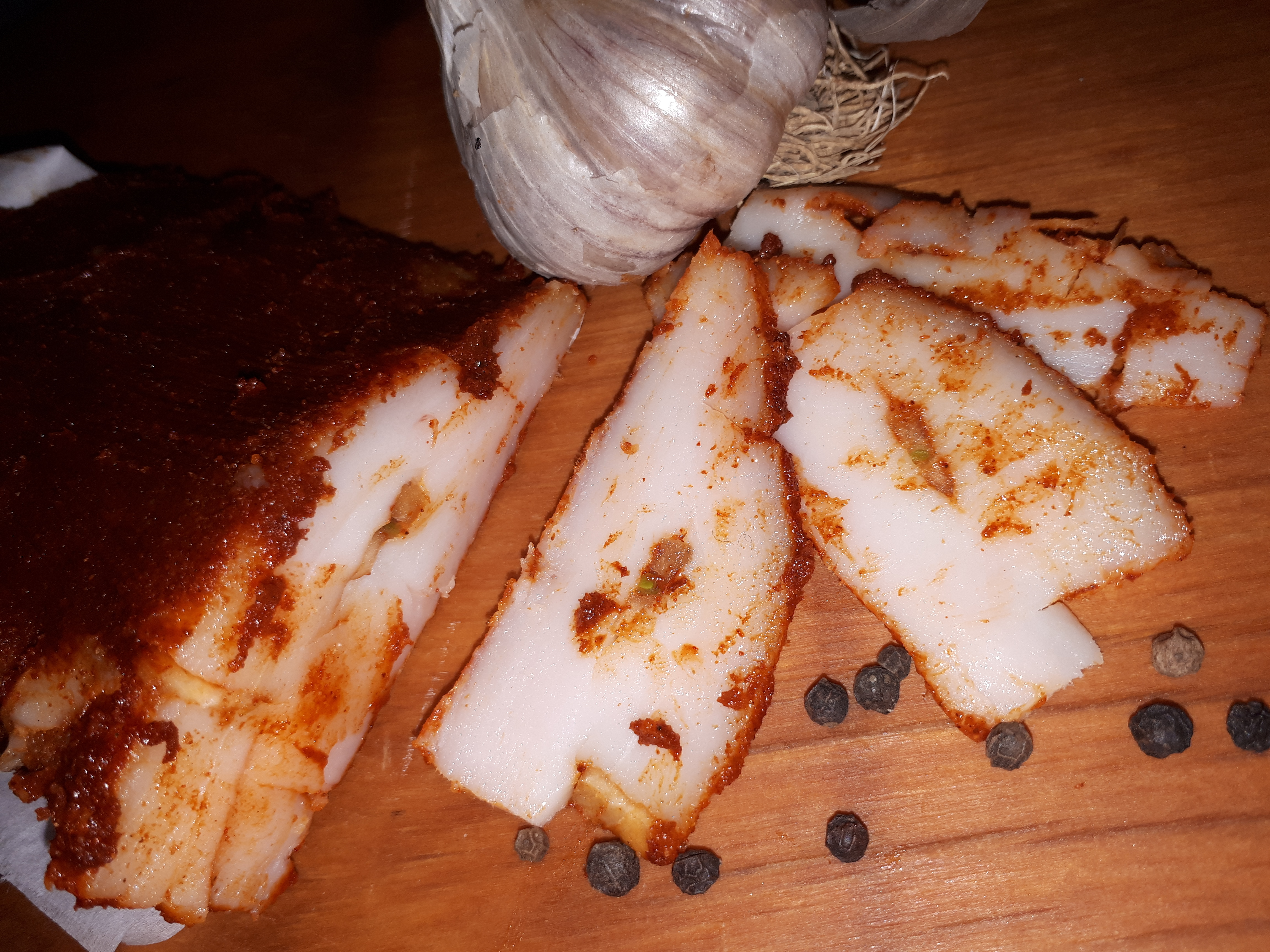 Сало с перцем